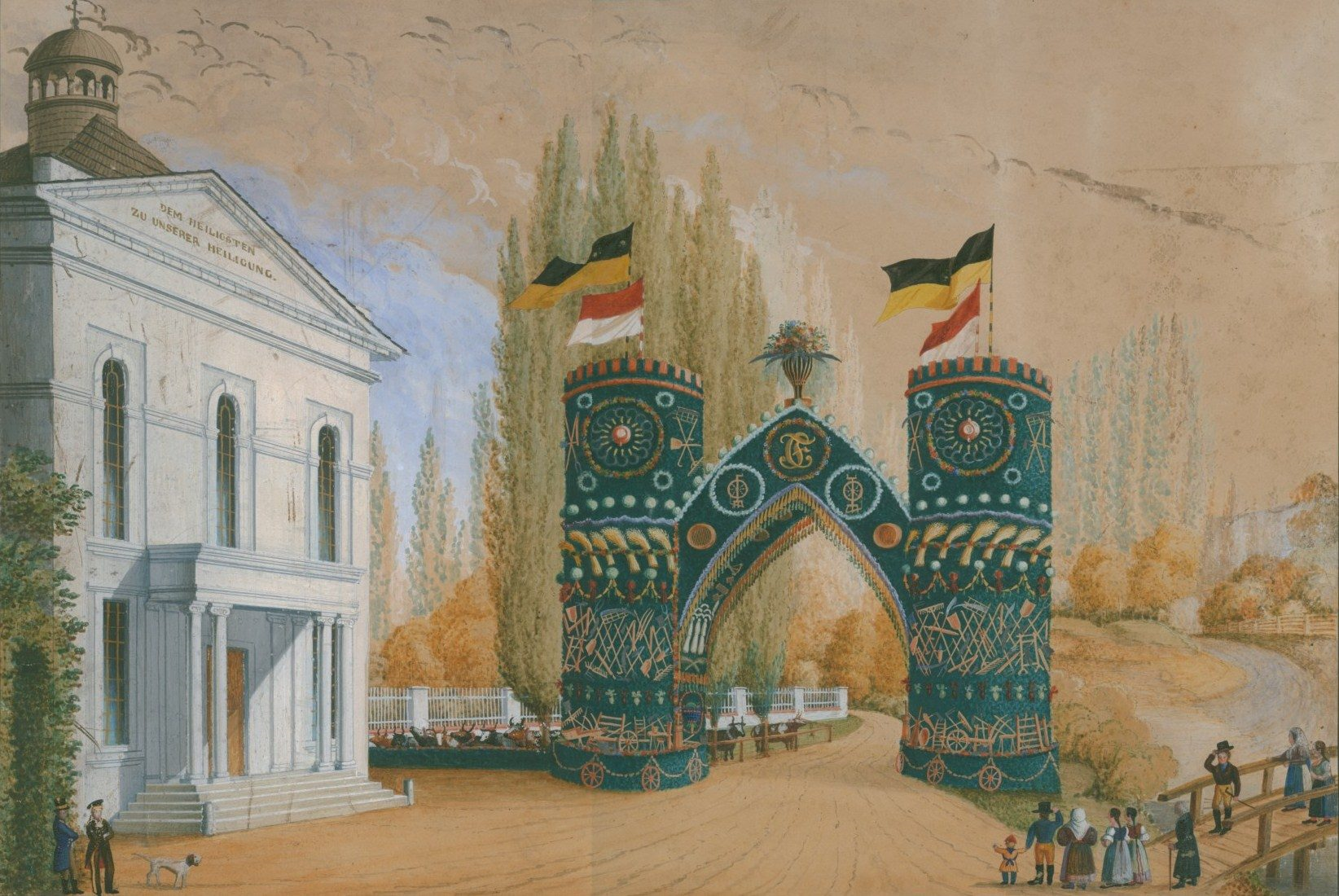 Slavobrána postavená v Kuníně v roce 1845 u příležitosti návštěvy arcivévody Františka Karla. Kresba Gustava Seiberta Kolorovaná litografie: Ostravské muzeum